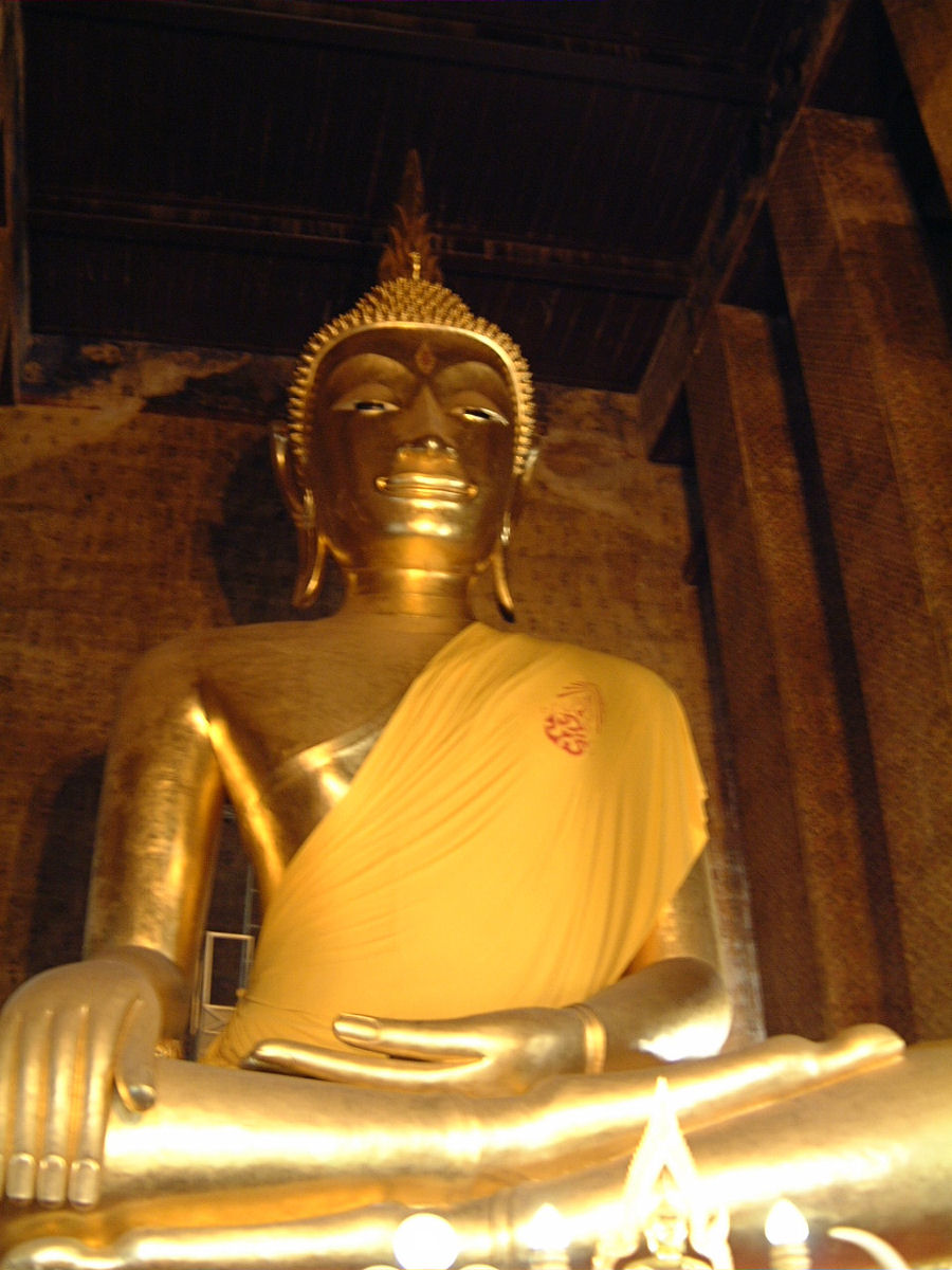 Wat Kanlayanimitr (วัดกัลยาณมิตรวรมหาวิหาร), Bangkok, Thailand